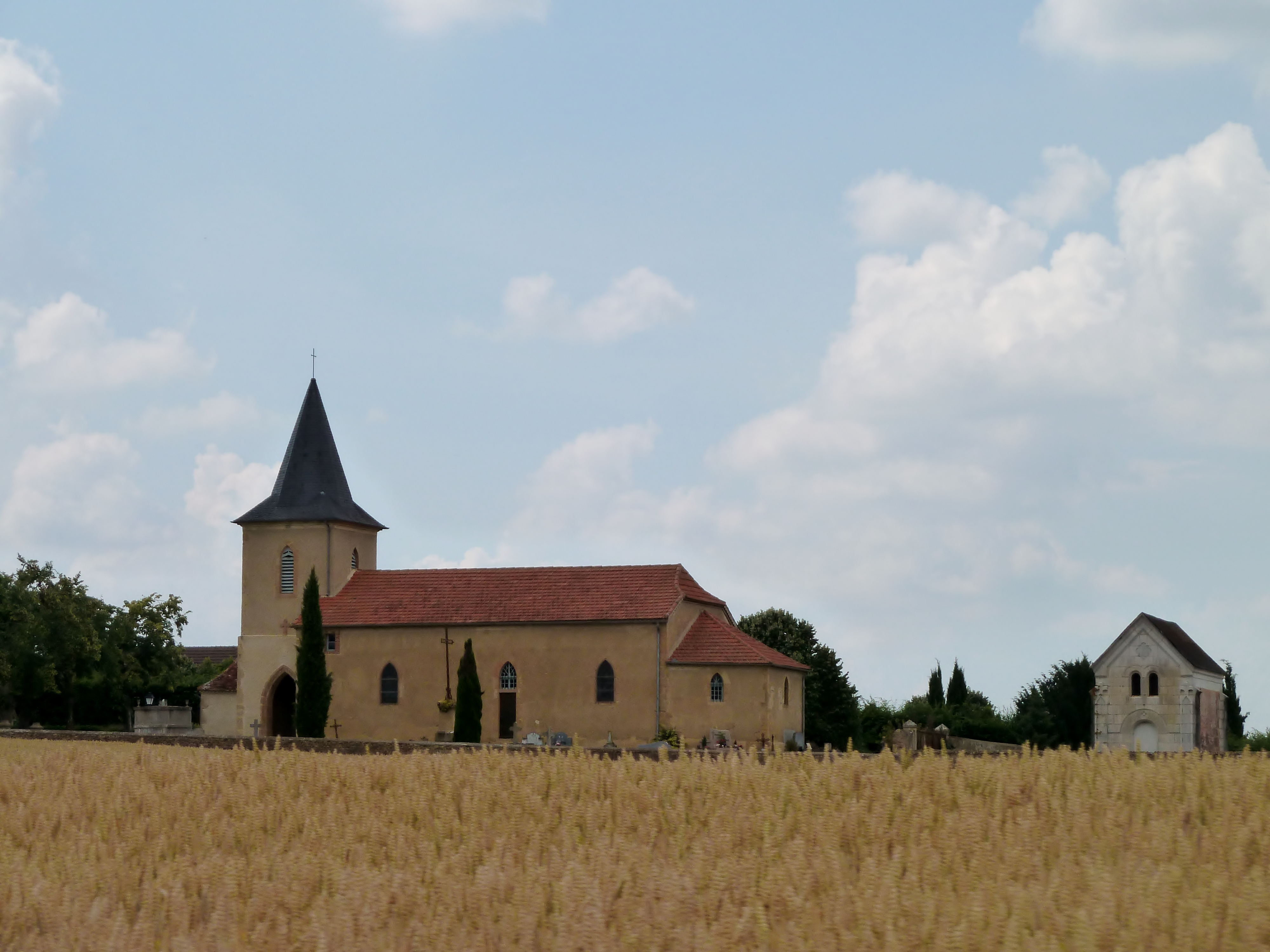 Église de Corbère-Abères